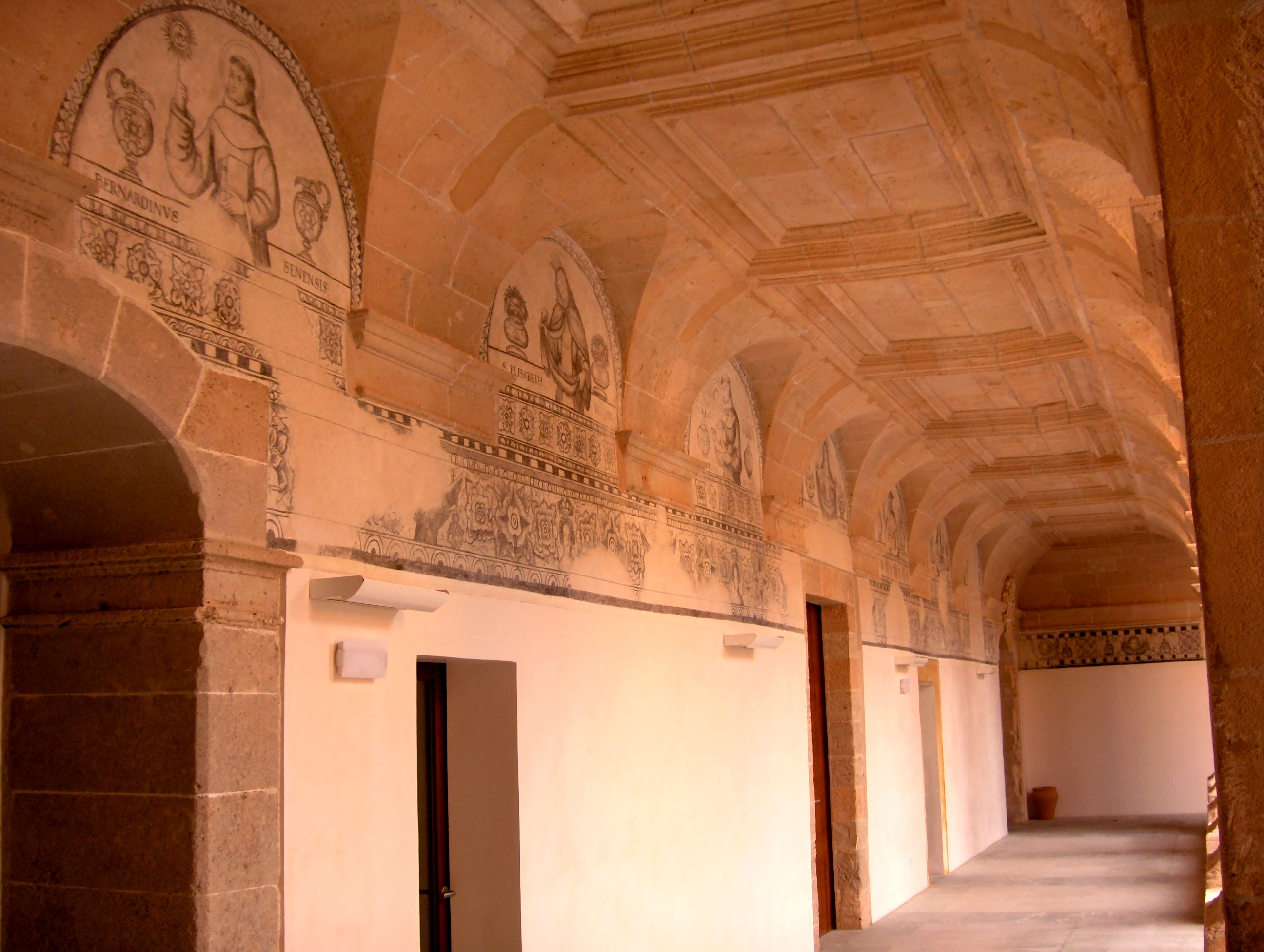 Galeria del claustre franciscà del Convent de Sant Bonaventura de Llucmajor, Mallorca, on s'observen les pintures restaurades que decoraven les parets.